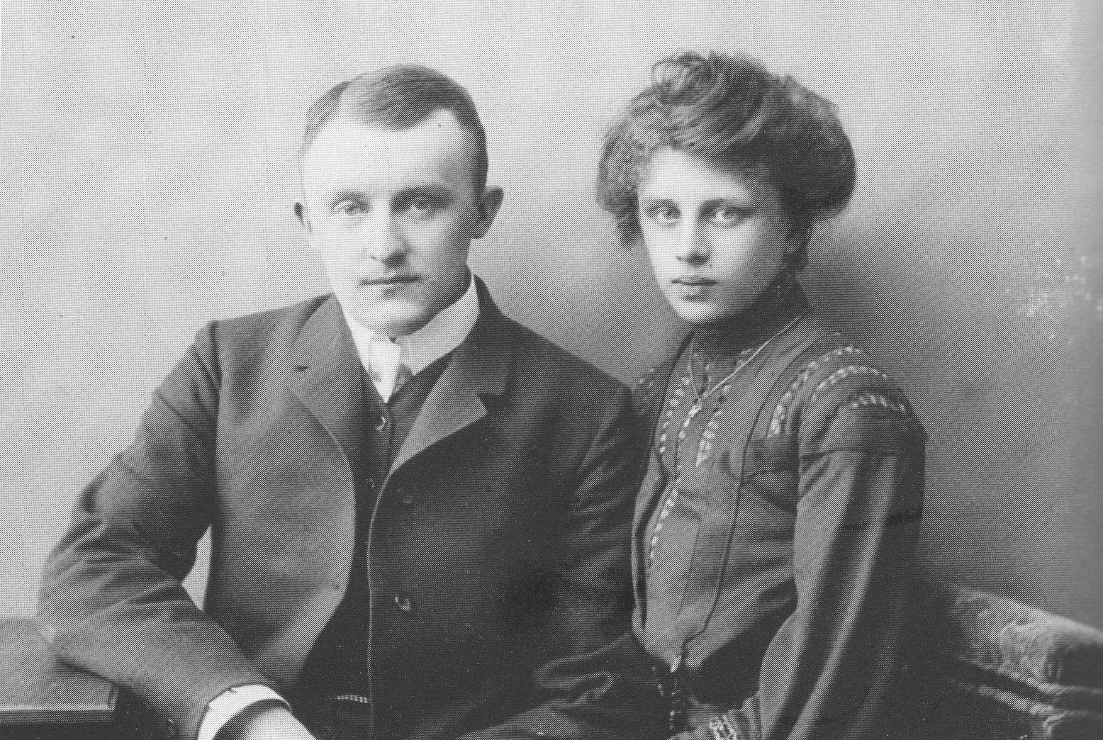 Jørgen Skafte Rasmussen und seine Frau Theresia, geb. Liebe